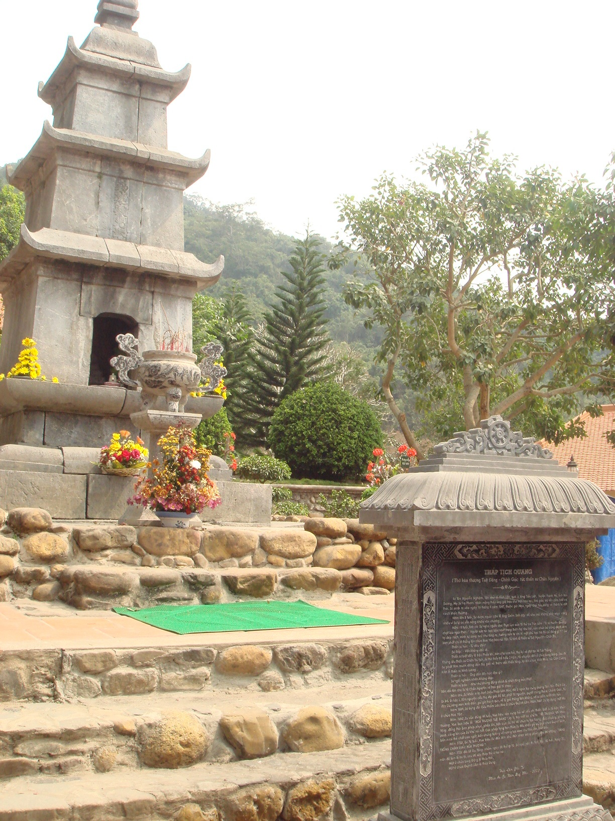 Chùa Lân-Thiền viện Trúc Lâm Yên Tử